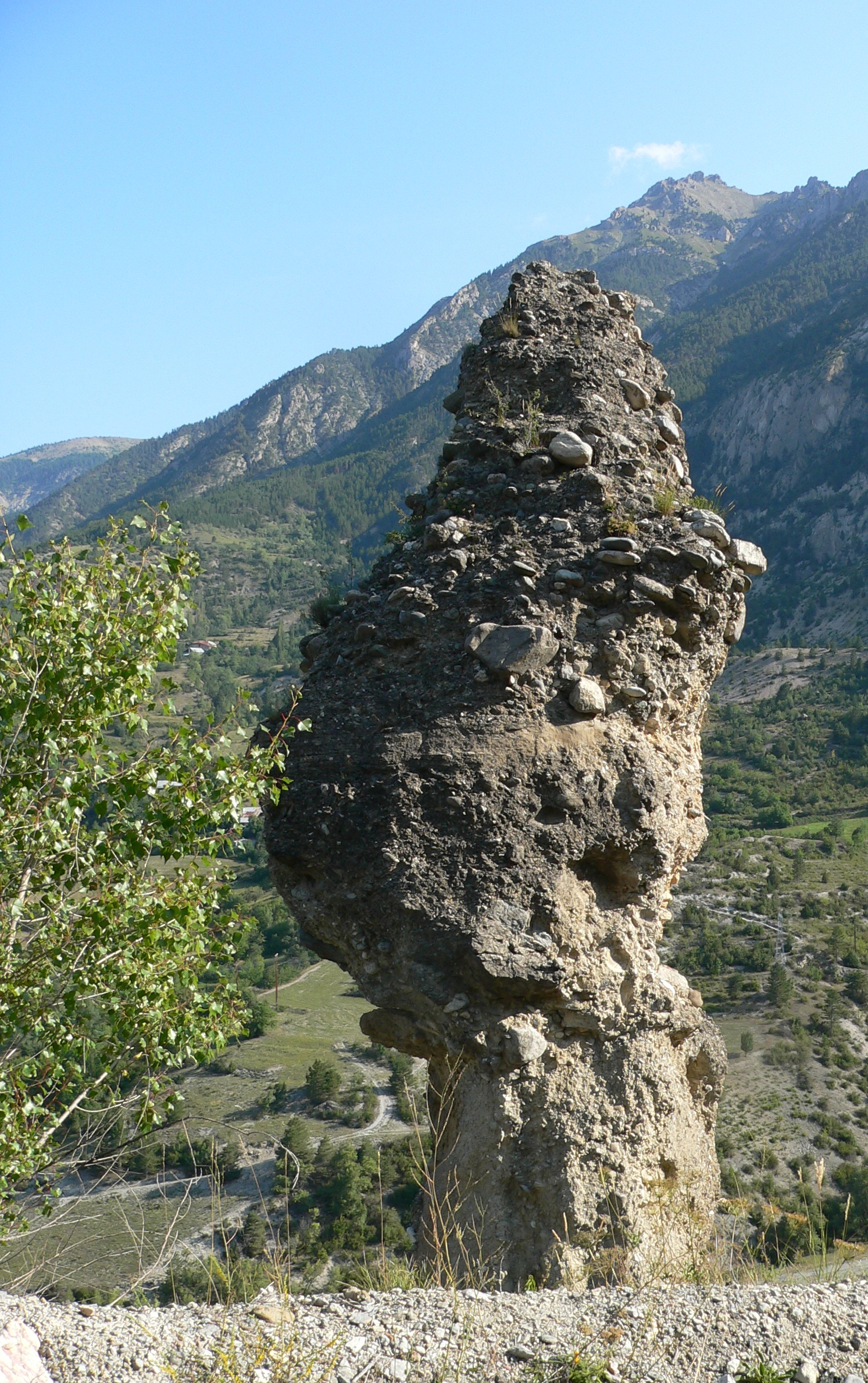 Konglomerat. Guillestre. Alpen F